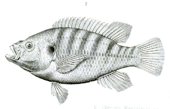 Tristramella simonis